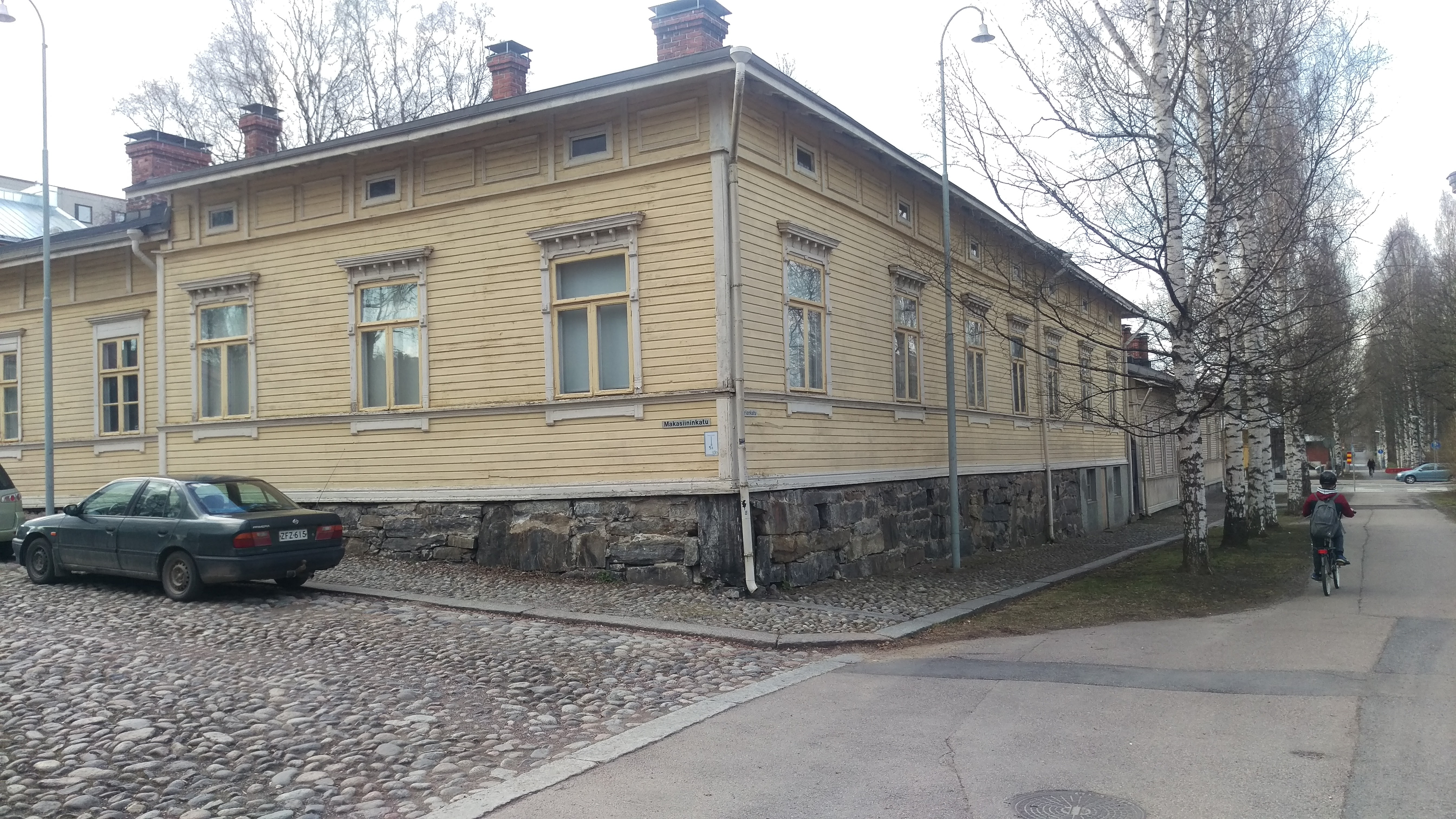 Tampere